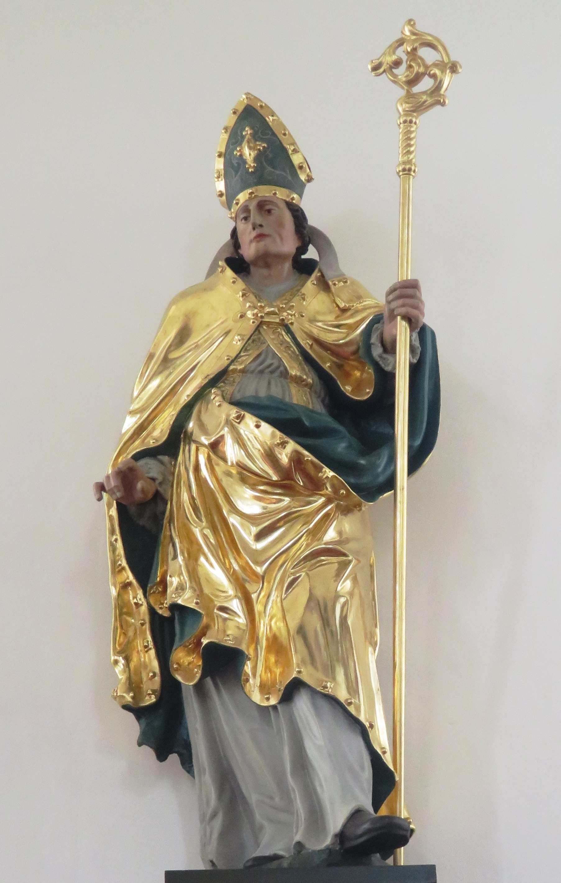 St. Martin (Bischof Martin von Tours), kath. Pfarrkirche St. Martin Unterkirchberg